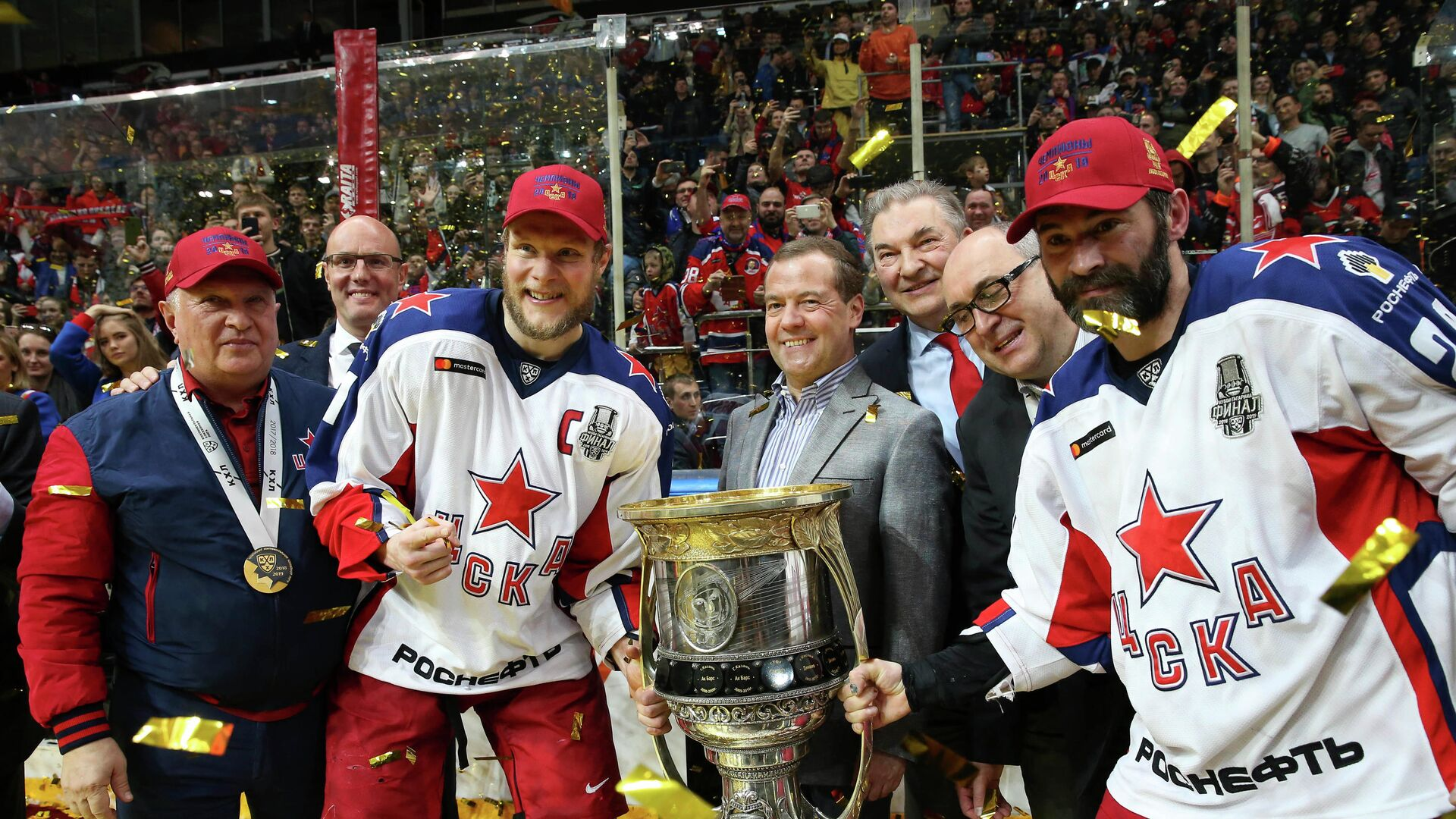 HC CSKA Moscow - Avangard Omsk (19.04.2019)